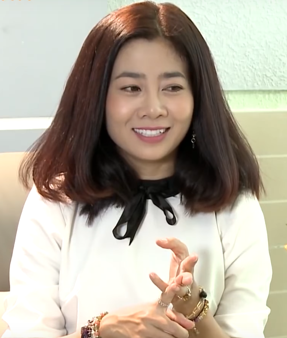 Diễn viên Mai Phương trong chương trình Bật Mí Tủ Lạnh Nhà Sao của BEE Entertainment và HTV7